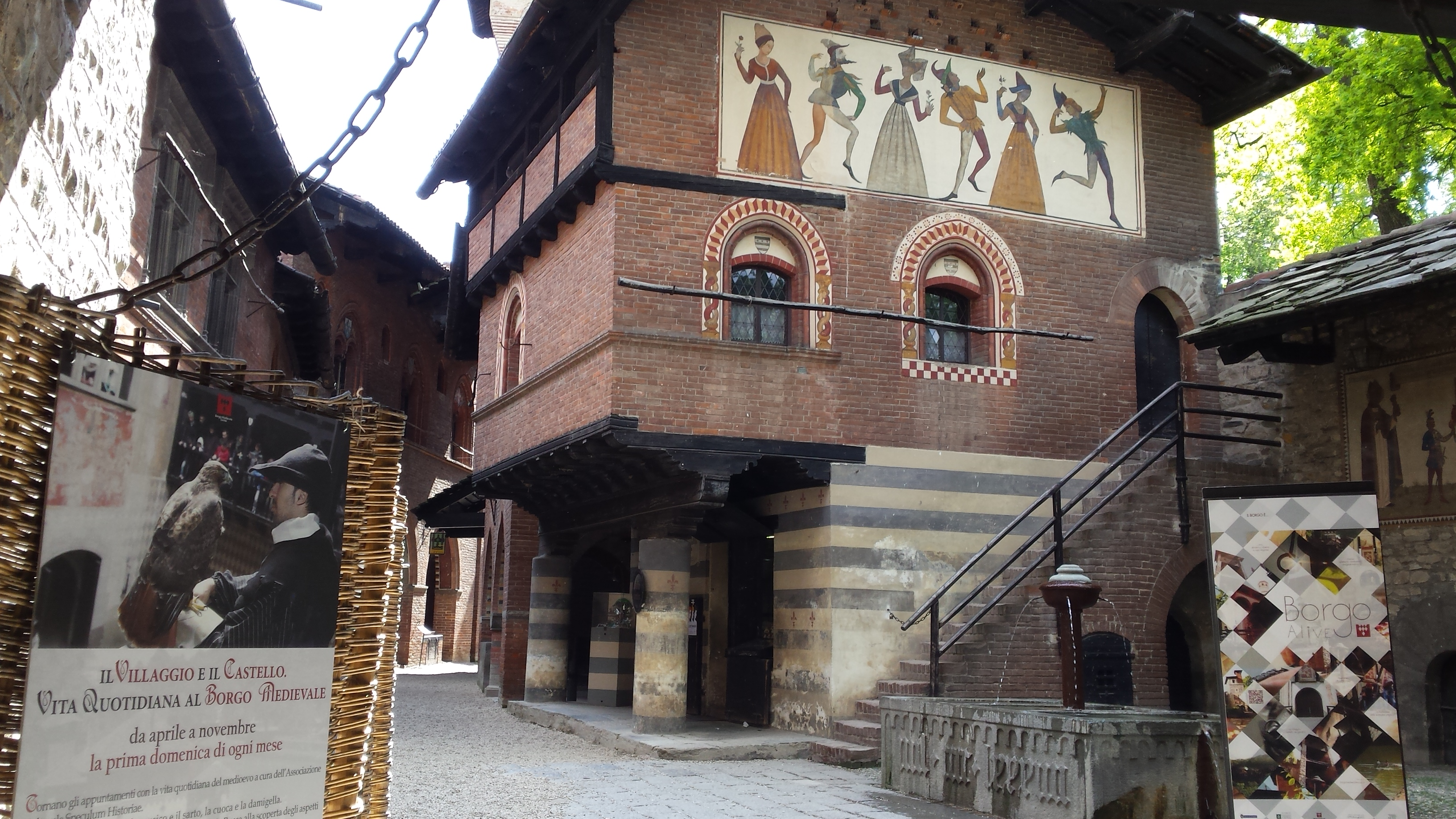 Borgo medioevale di Torino This is a photo of a monument which is part of cultural heritage of Italy.